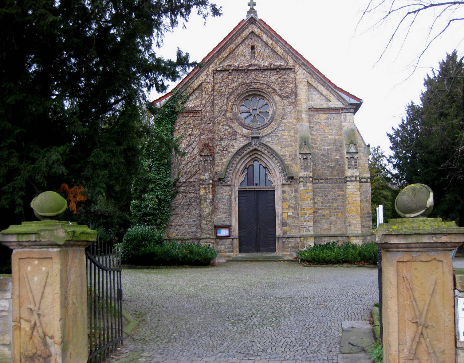 Kapelle des Johannisfriedhofs in Osnabrück